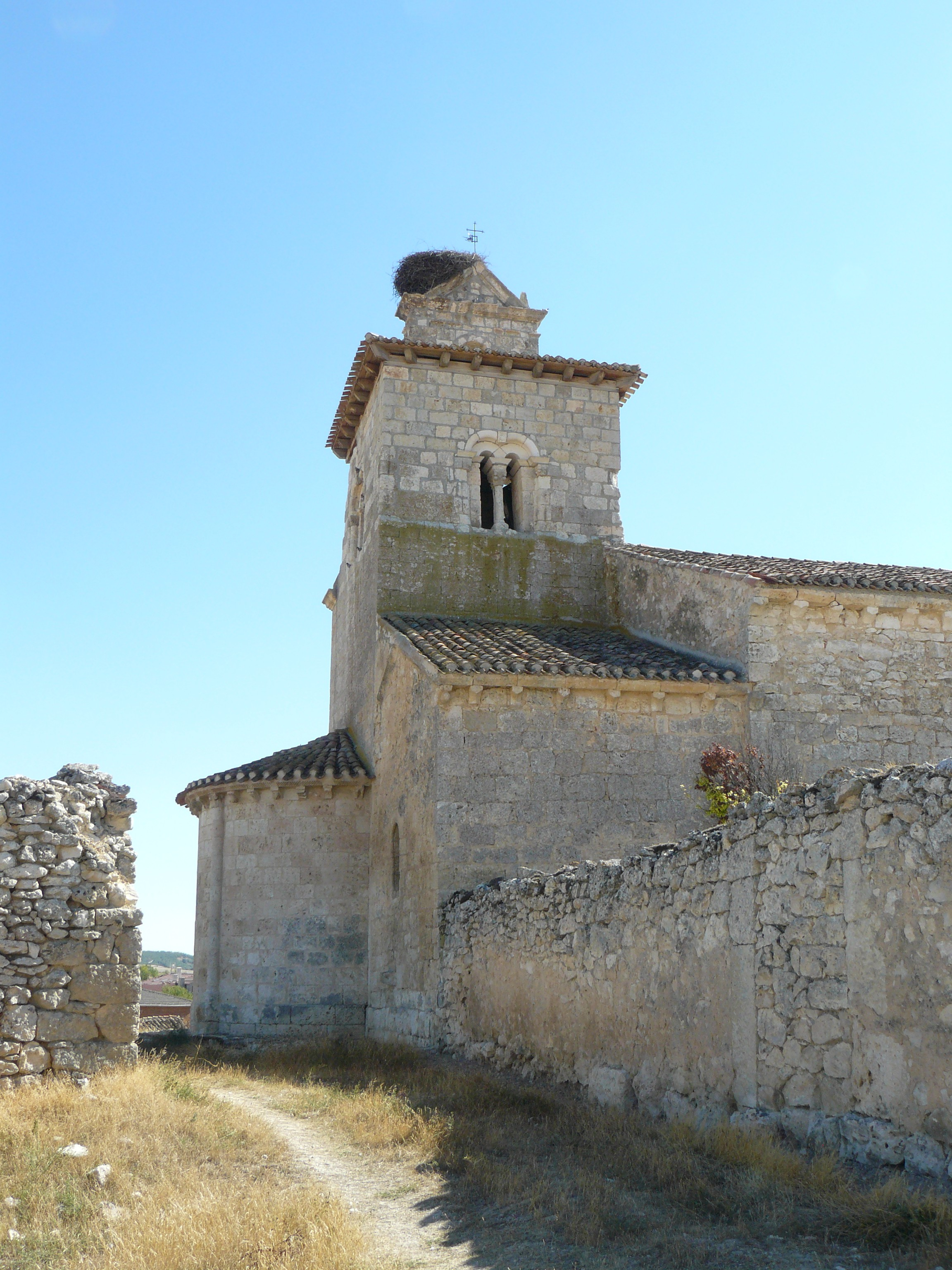 Bahabón de Esgueva, Burgos.